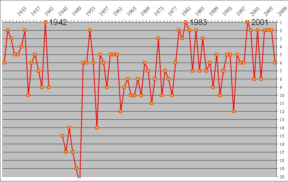 posizioni AS Roma nella storia fino 2009